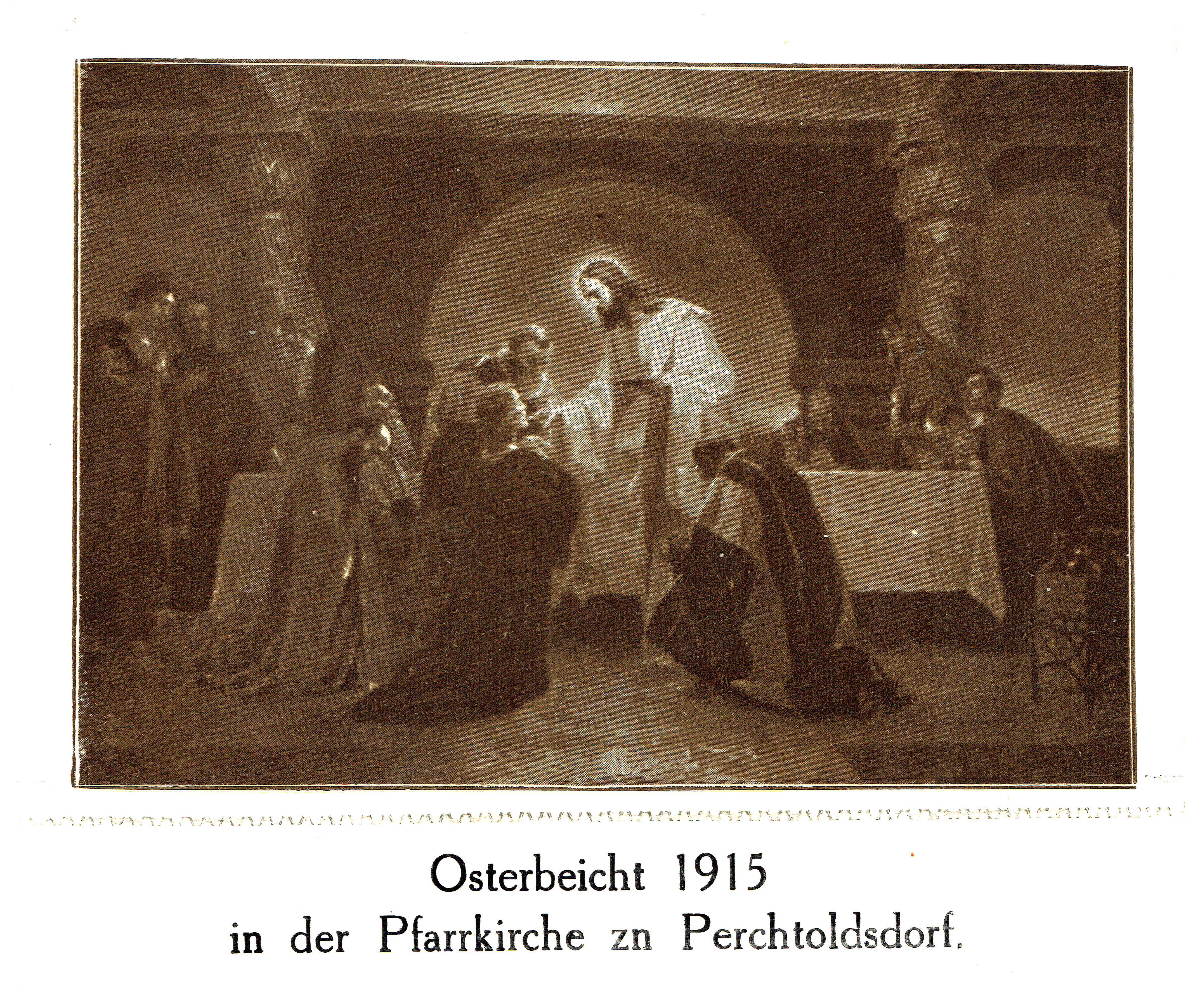 Beichtzettel aus der Pfarre Perchtoldsdorf 1915. Unterer Teil mit der Beschreibung abtrennbar (Perforation)